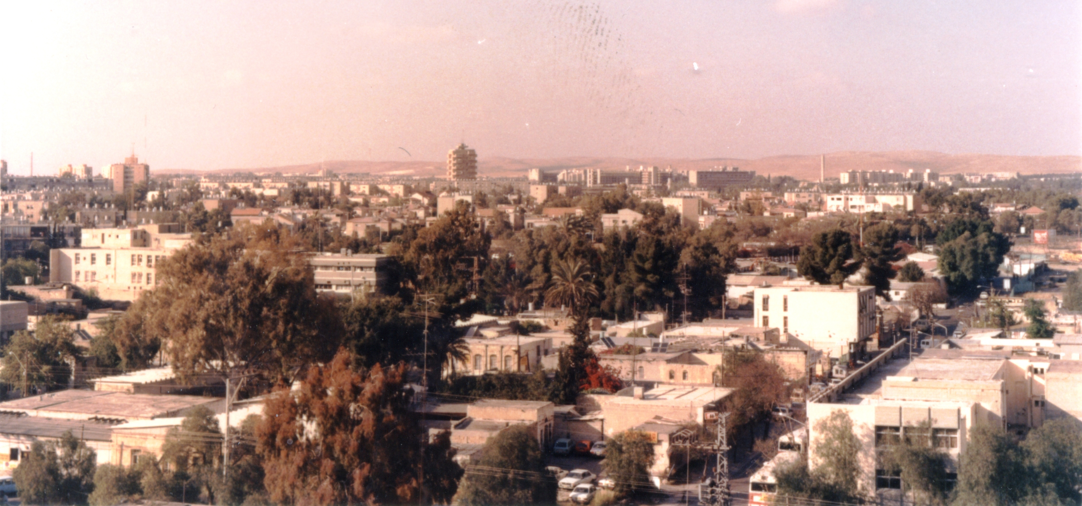 מבט על העיר באר שבע, אמצע שנות השמונים